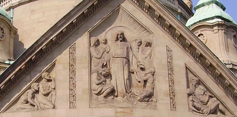 Giebel der Christuskirche in Mannheim.